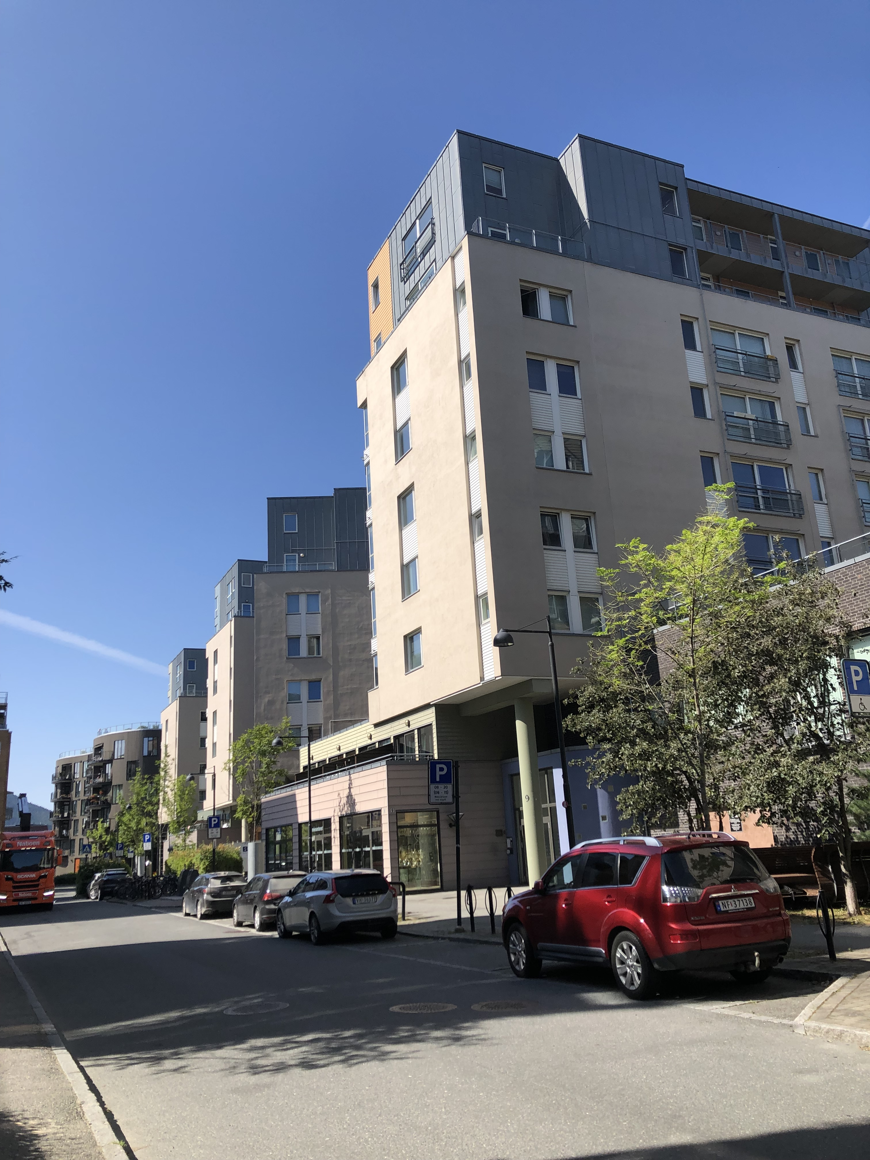 Dyre Halses gate, Trondheim, 2019